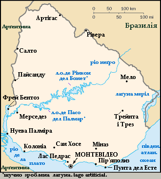 Mapa Uruguaye v ukrajinštině